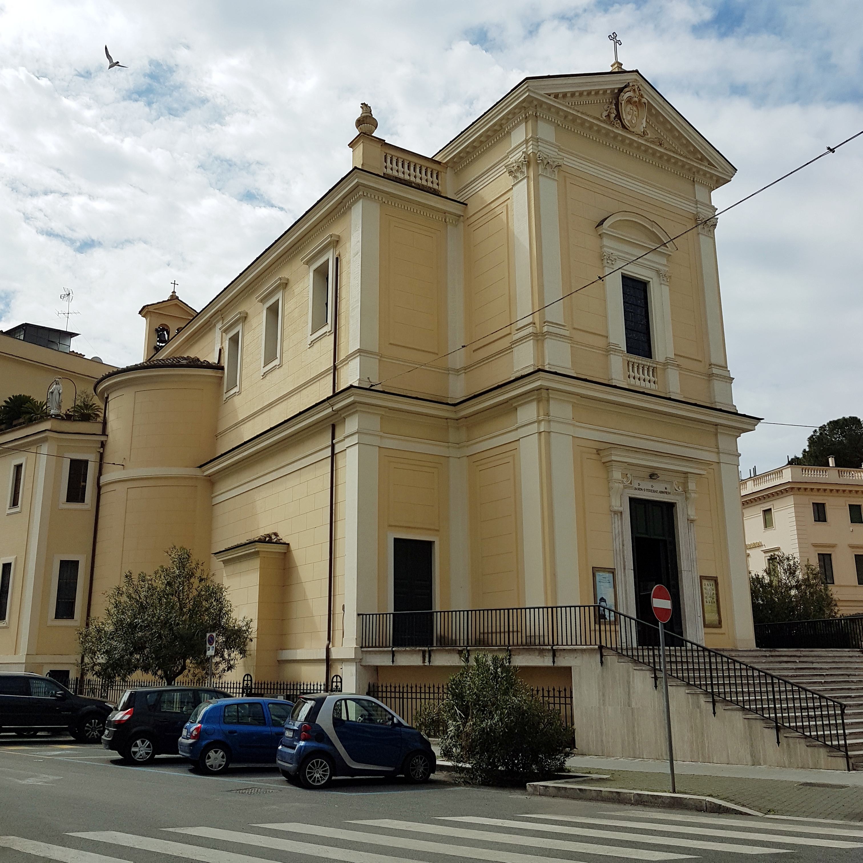 Santa Teresa in Panfilo (Rome), Aussenansicht